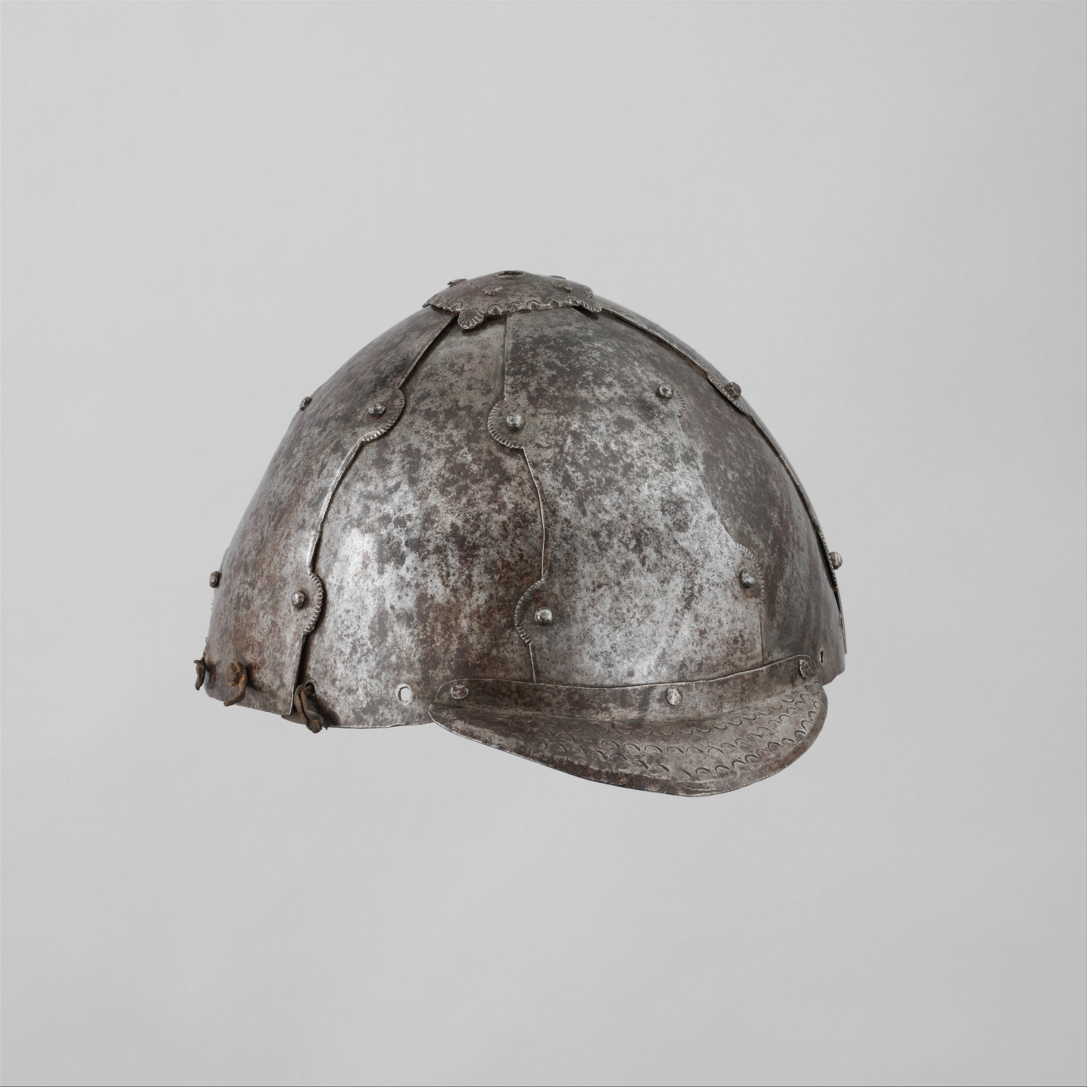 Korean or Mongolian; Helmet; Helmets